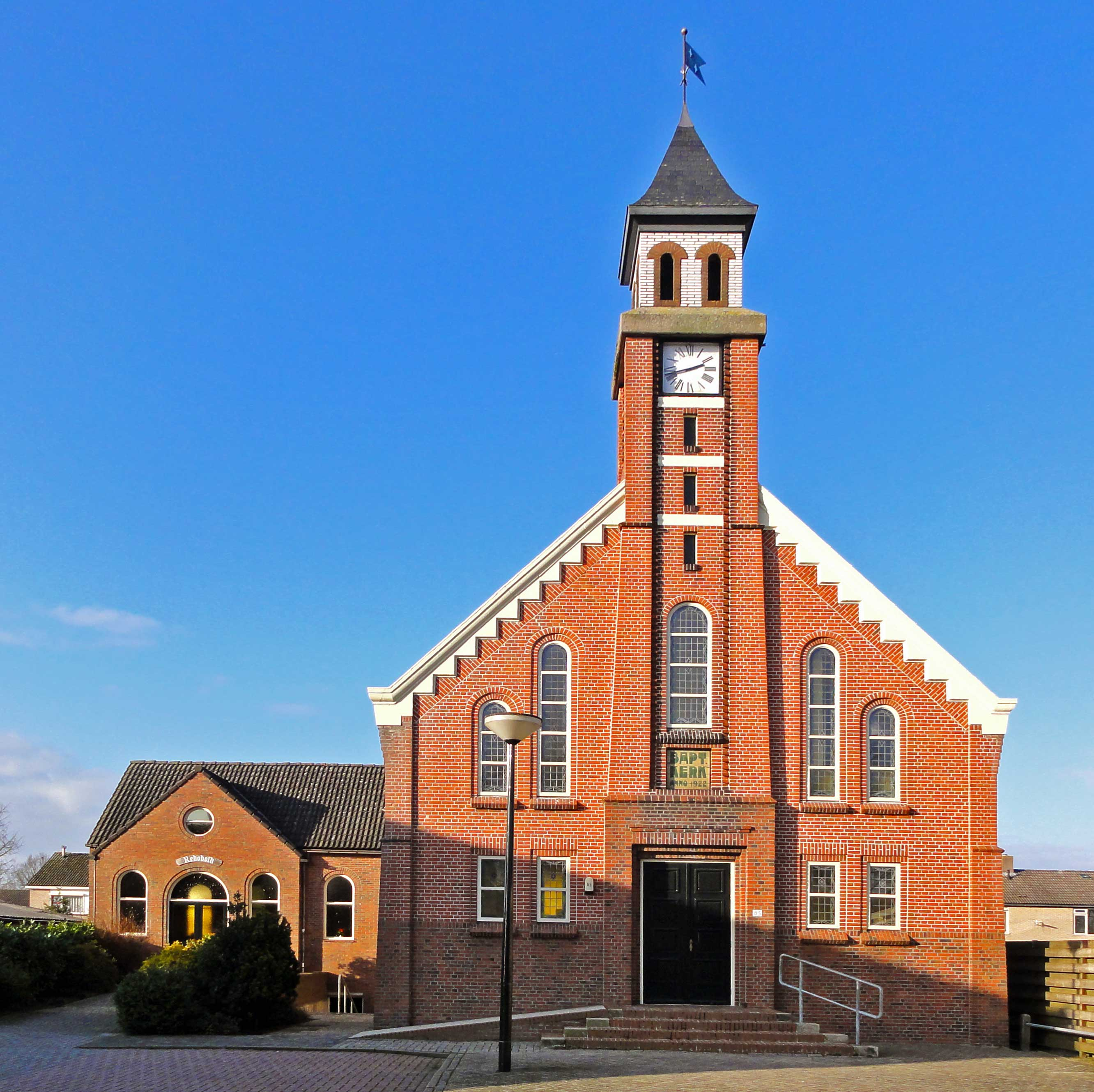 Zuiderdiep 85 Baptistenkerk Tweede Exloërmond